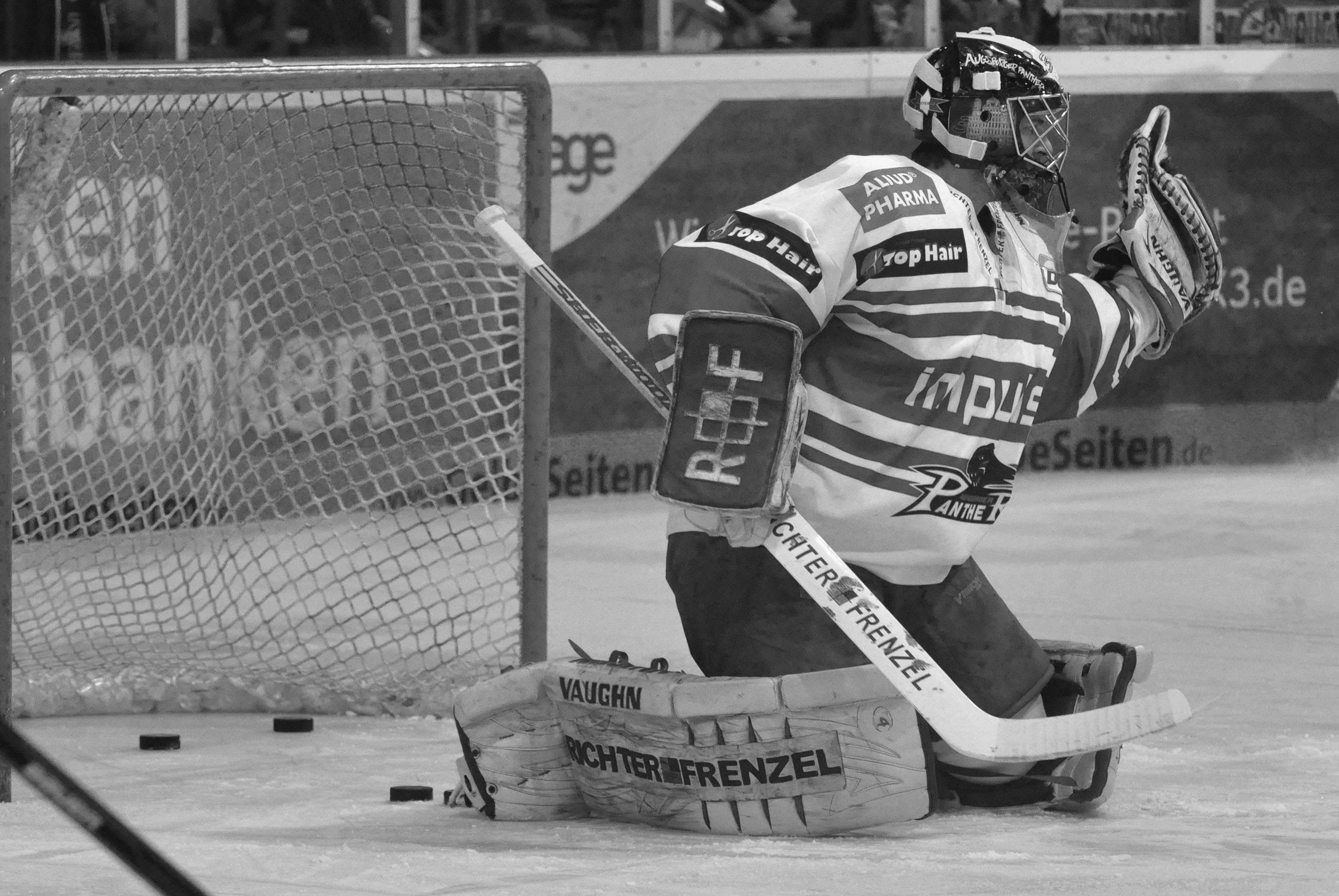 Straubing Tigers - Augsburg Panther 04.03.2012 DEL Deutsche Eishockey Liga